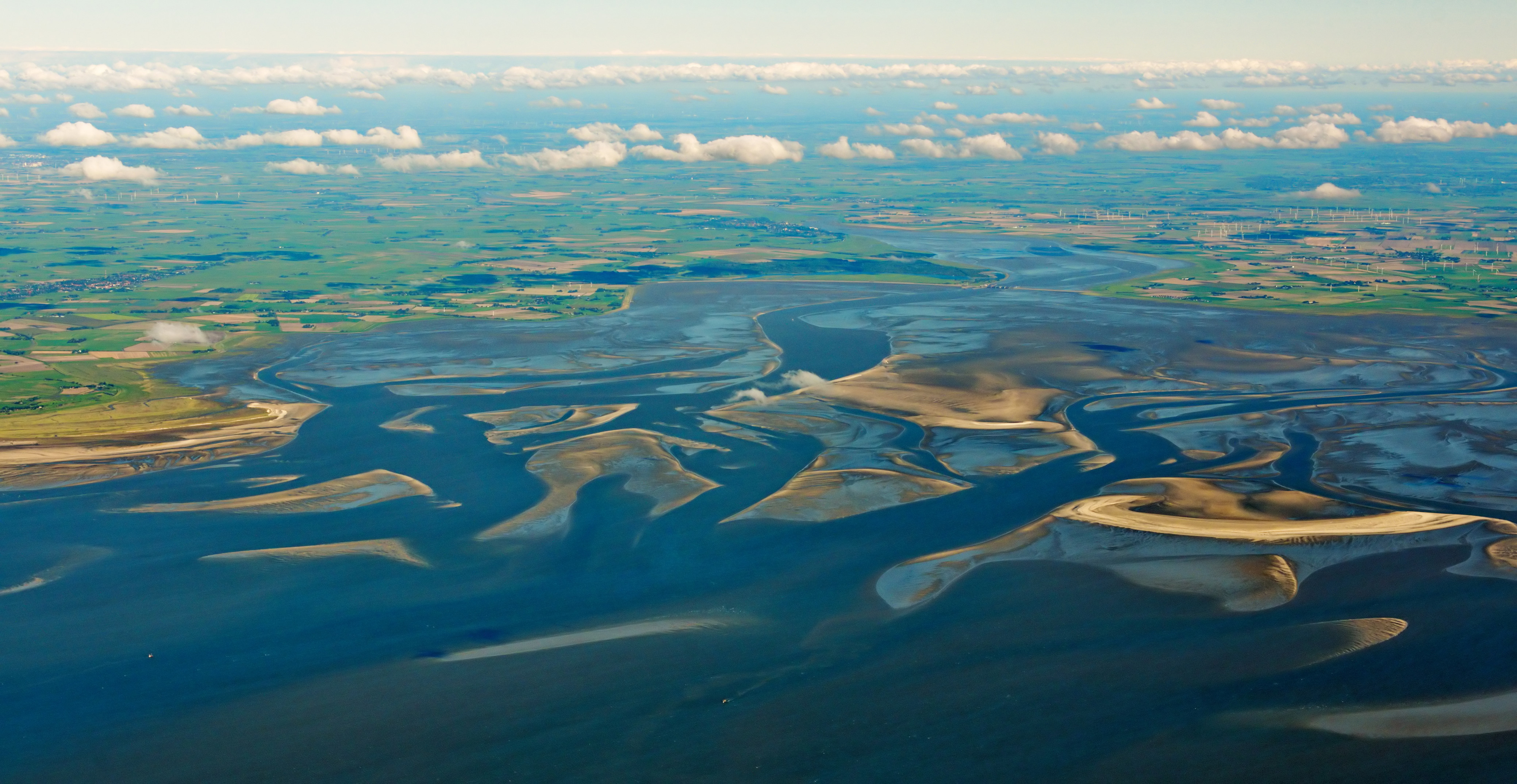 Fotoflug über das nordfriesische Wattenmeer - Eiderstedt (von SW), rechts Eidersperrwerk